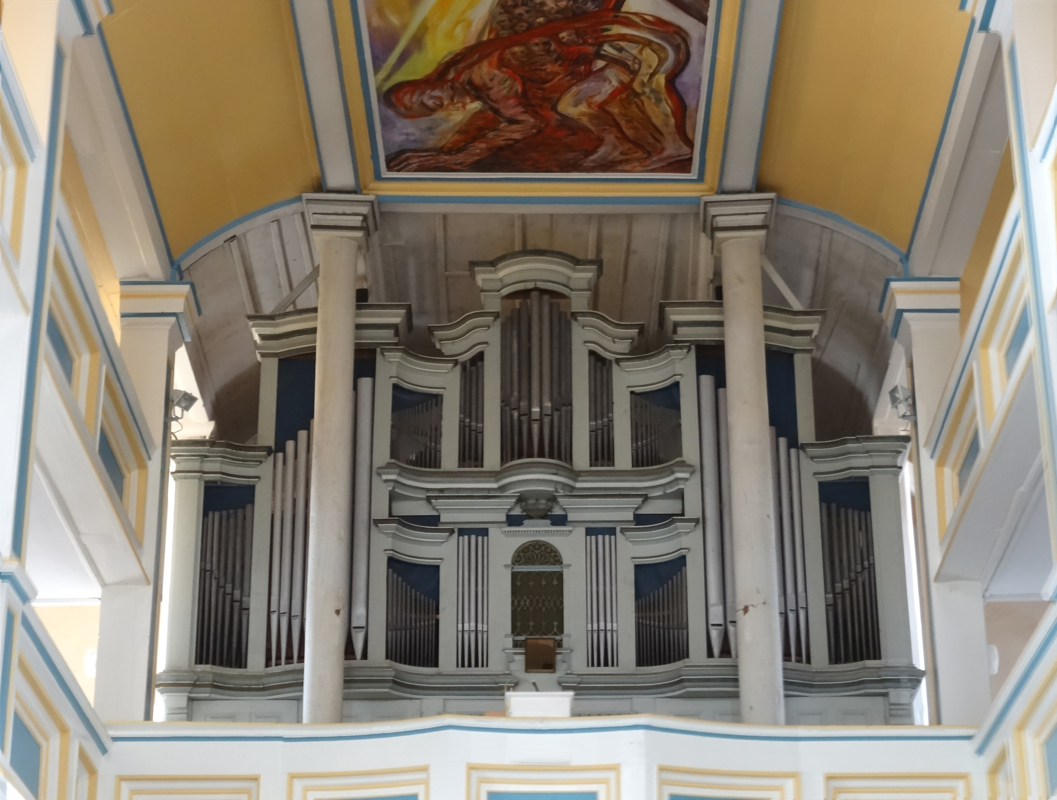 St. Crucis Wölfis, Orgel von Georg Franz Ratzmann 1819